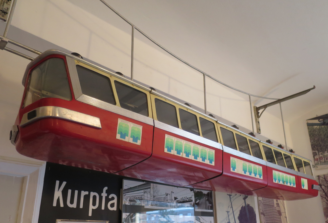 Modell des Aerobusses im Verkehrsmuseum §Depot 5" in Mannheim